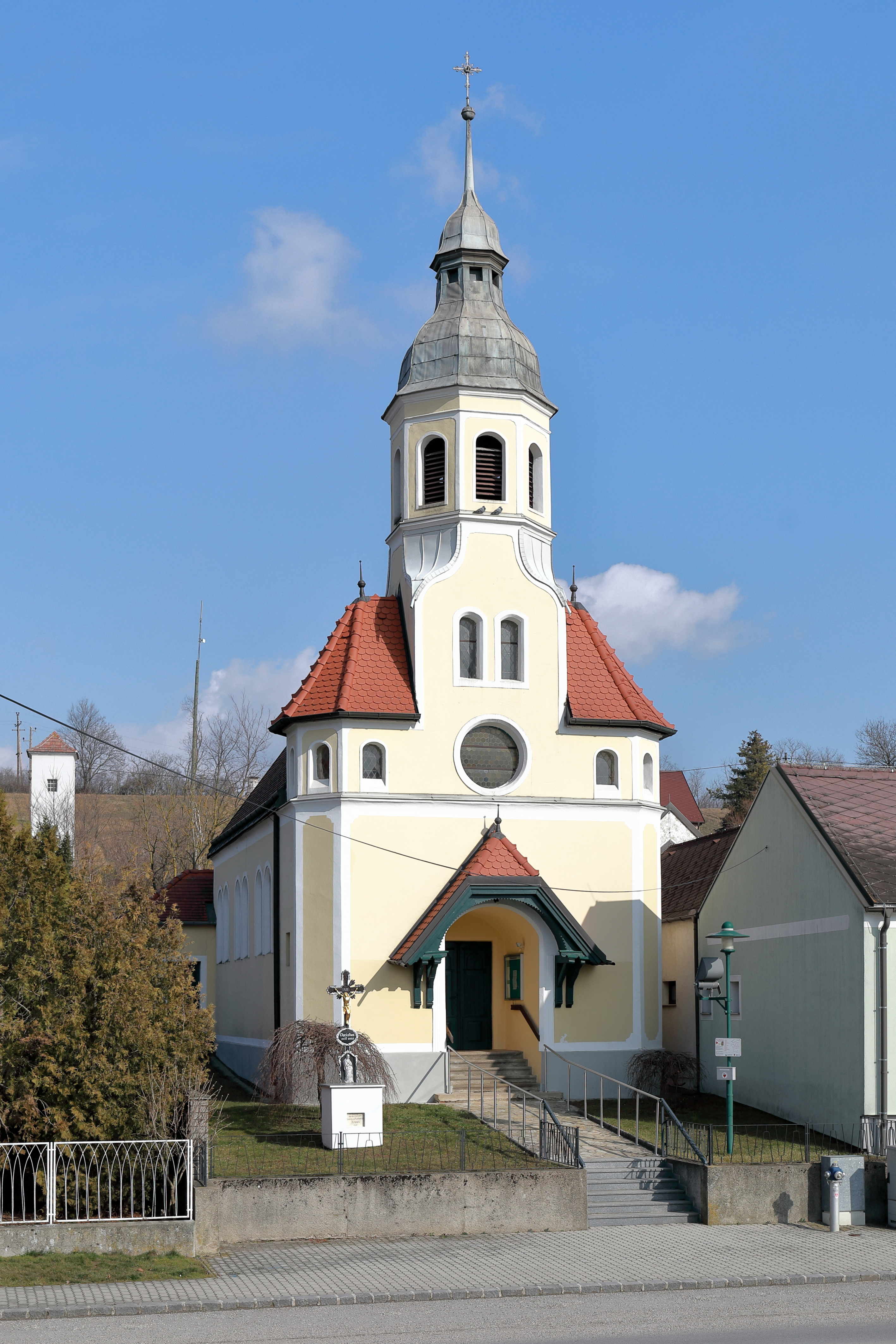 Südwestansicht der röm.-kath. Ortskapelle hl. Vitus in Erdpreß, ein Ortsteil der niederösterreichischen Marktgemeinde Sulz im Weinviertel.Die leicht erhöht in der Mitte von Erdpreß gelegene Kapelle ist ein historisierender Bau, der nach Plänen des Architekten Karl Weinbrenner errichtet wurde. Am 5. Juni 1905 erfolgte die feierliche Grundsteinlegung und mit September 1906 war das Bauwerk fertiggestellt. Die Einrichtungsarbeiten zogen sich über Jahre hinweg, sodass erst am 19. November 1917 die feierliche Weihe durch den Heiligenkreuzer Abt Gregor Böck stattfand.